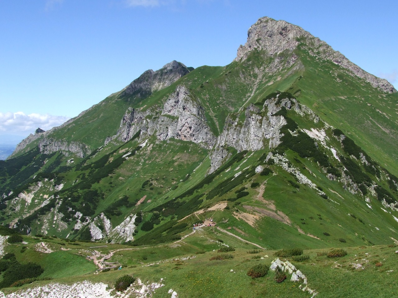 Hawrań, Płaczliwa Skała i Szeroka Przłęcz Bielska. W stokach Płaczliwej skaly dwie Płaczliwe Kazalnice